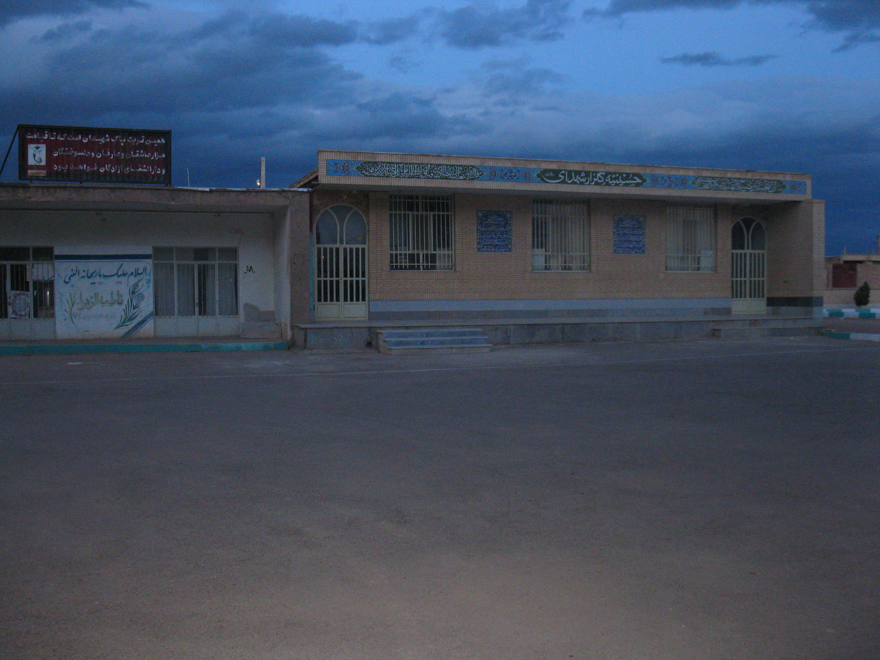 آذر 1392